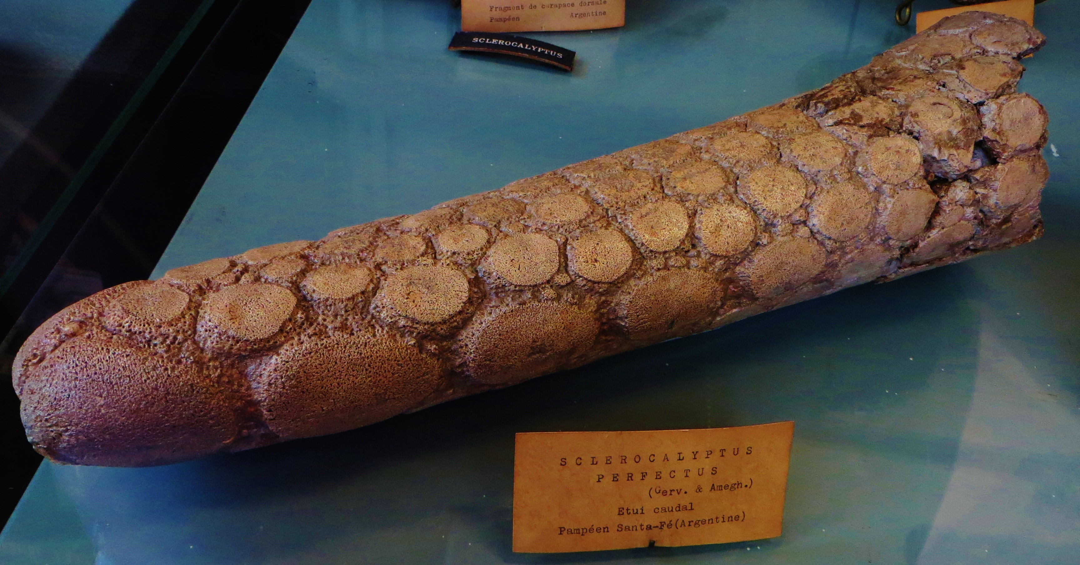 Fossil of Sclerocalyptus, an extinct mammal - Took the photo at Musee d'Histoire Naturelle, Paris